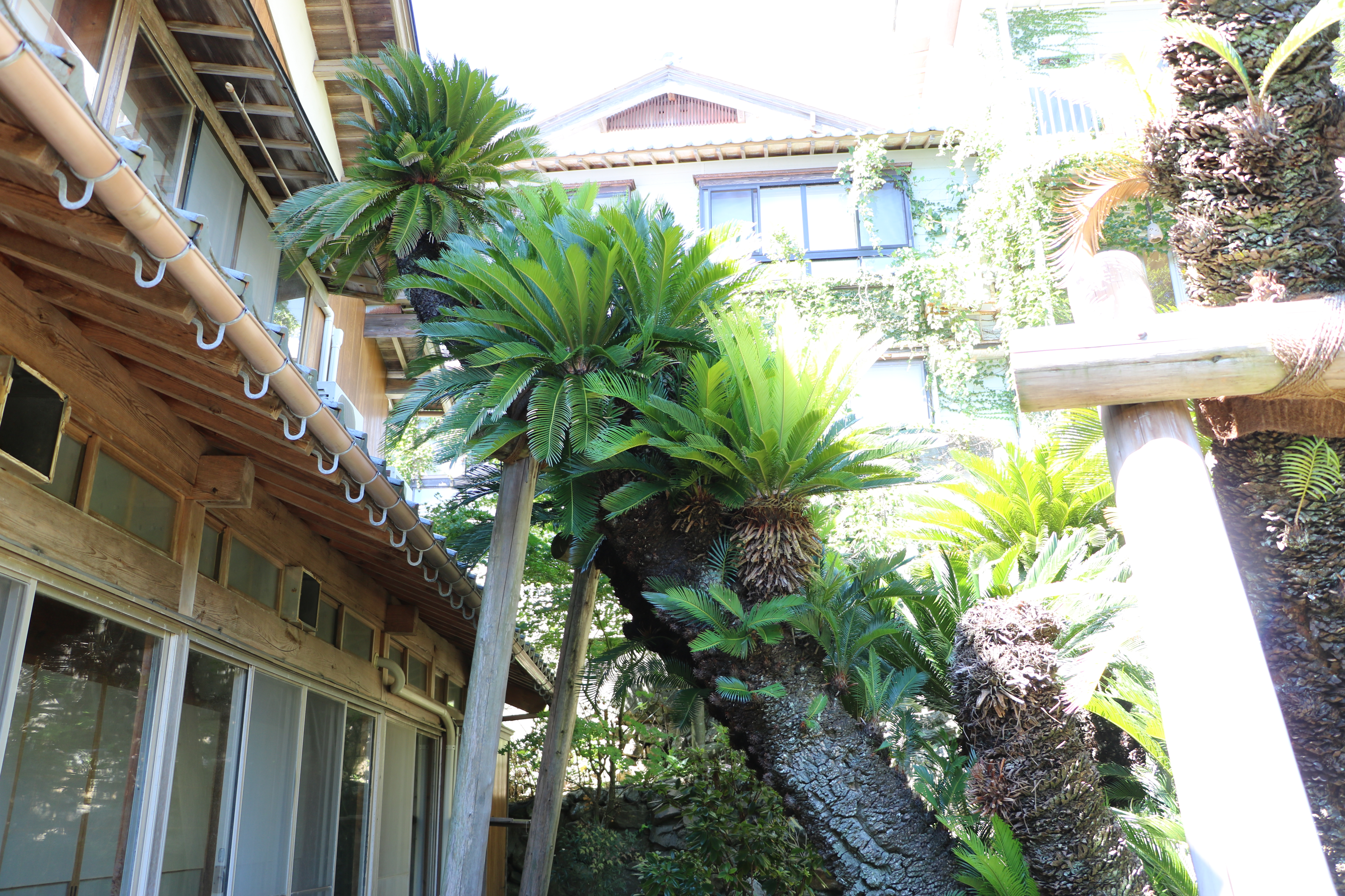 常神のソテツ（国指定天然記念物、福井県三方上中郡若狭町）